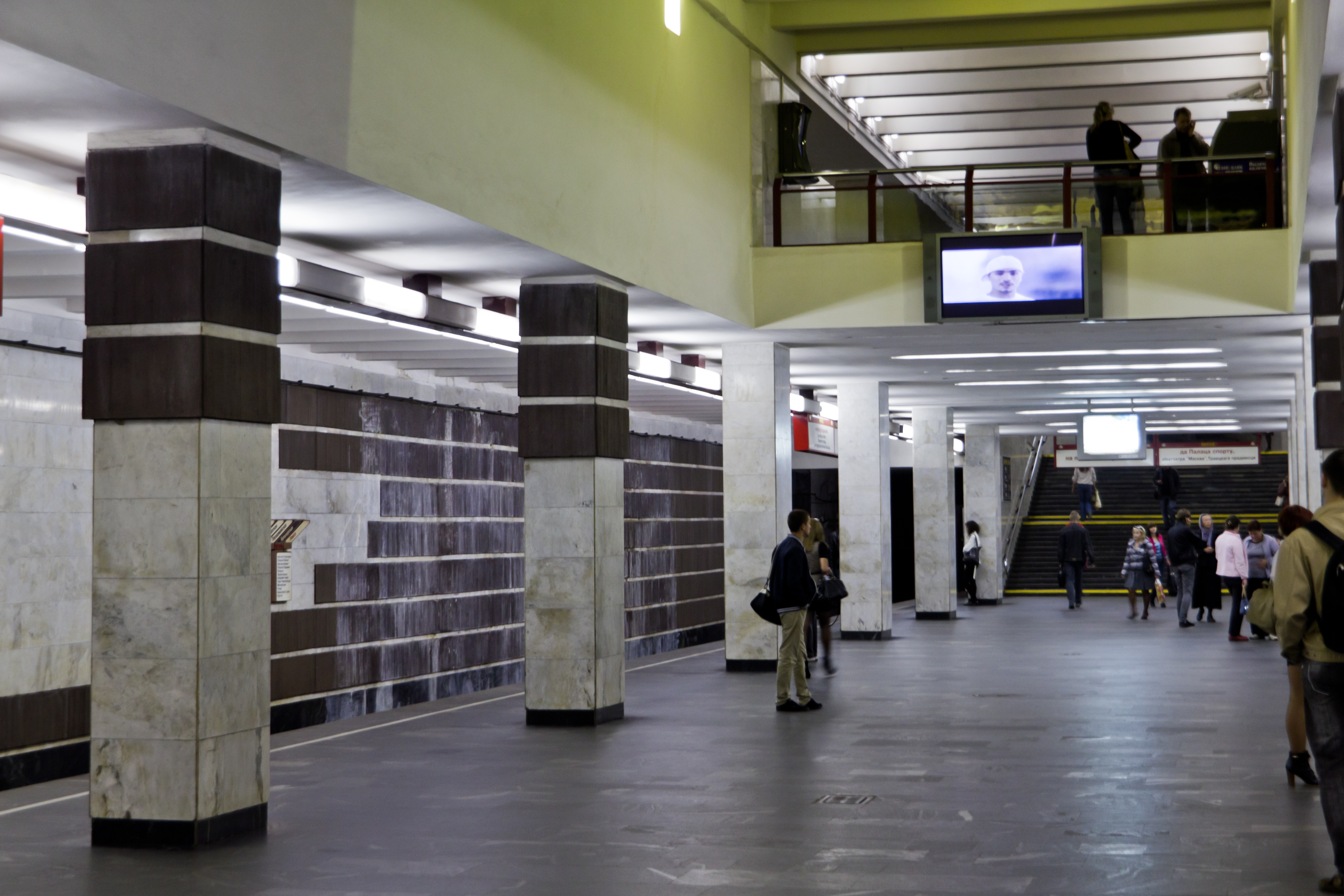 Станция метро «Немига», Минск